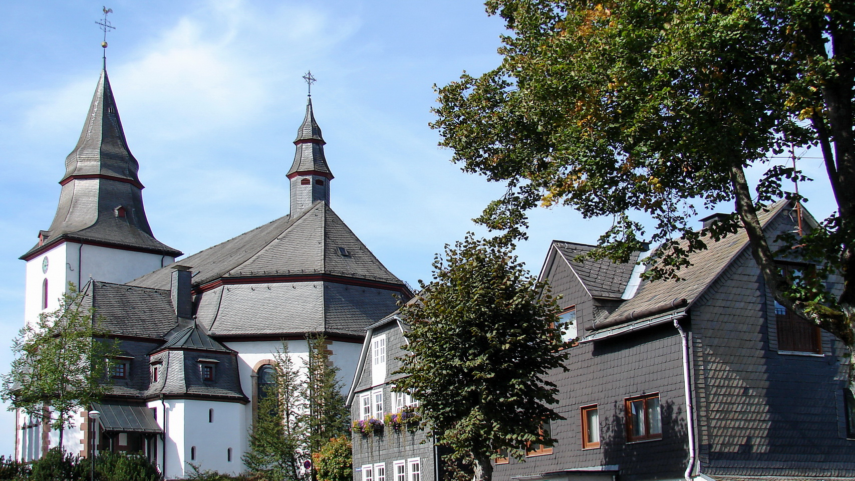 Die St.- Jakobus-Kirche in Winterberg im Hochsauerlandkreis ist eine katholische Pfarrkirche, deren Entstehung ins 13. Jahrhundert zurückreicht. In ihrer jetzigen Form wurde sie beim Wiederaufbau nach dem letzten Brand von 1791 errichtet.